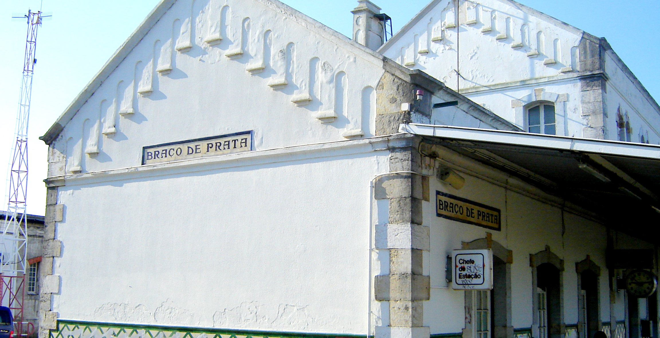 Edifício principal da Estação ferroviária de Braço de Prata